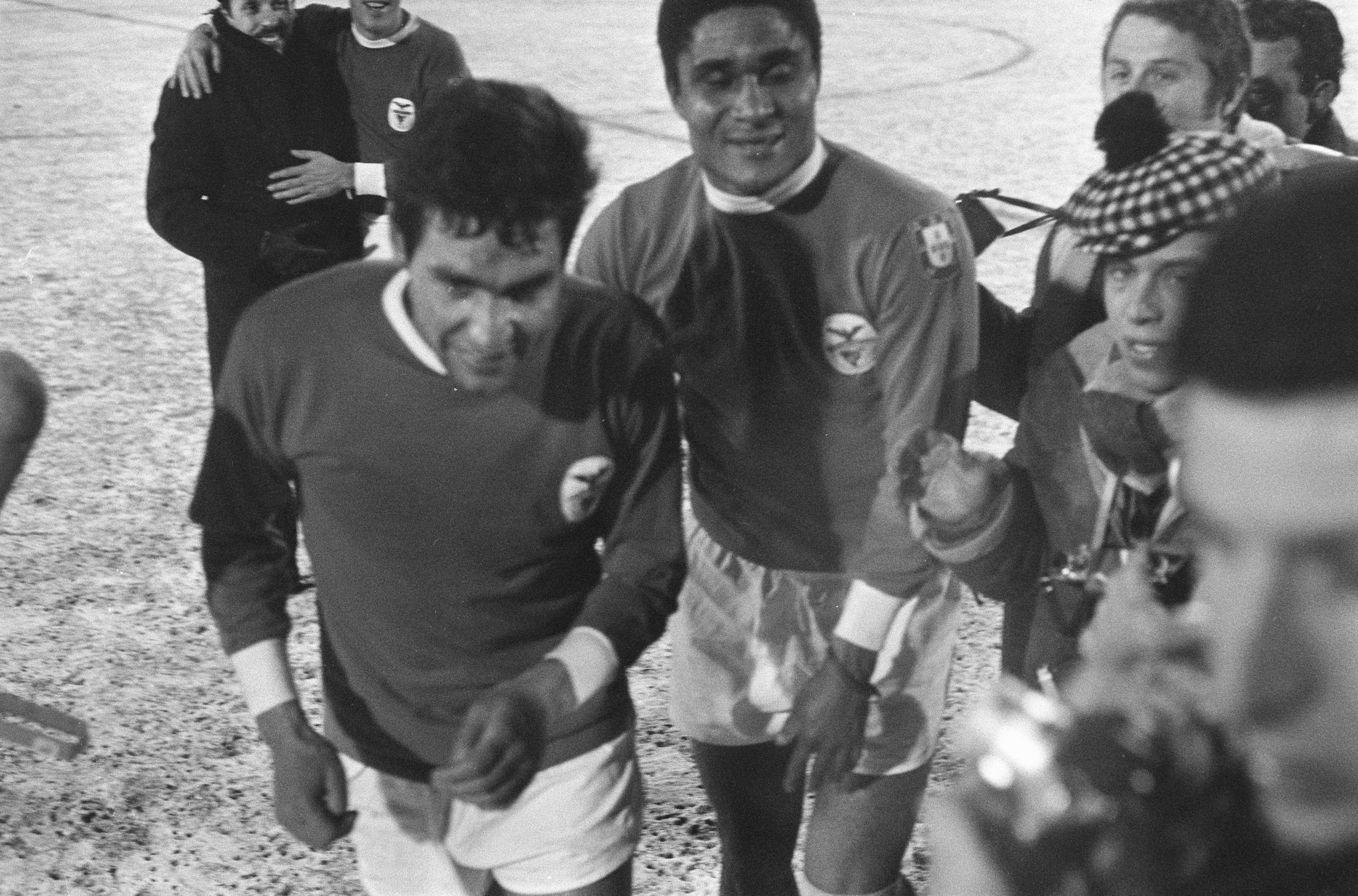 Collectie / Archief : Fotocollectie Anefo Reportage / Serie : [ onbekend ] Beschrijving : Ajax tegen Benfica 1-3, (kwartfinale Europacup I ) nr. 25 : Eusébio (rechts) Datum : 12 februari 1969 Locatie : Amsterdam Trefwoorden : Kwartfinales, sport, voetbal Persoonsnaam : Eusebio Instellingsnaam : Benfica Fotograaf : Nijs, Jac. de / Anefo Auteursrechthebbende : Nationaal Archief Materiaalsoort : Negatief (zwart/wit) Nummer archiefinventaris : bekijk toegang 2.24.01.05 Bestanddeelnummer : 922-0986